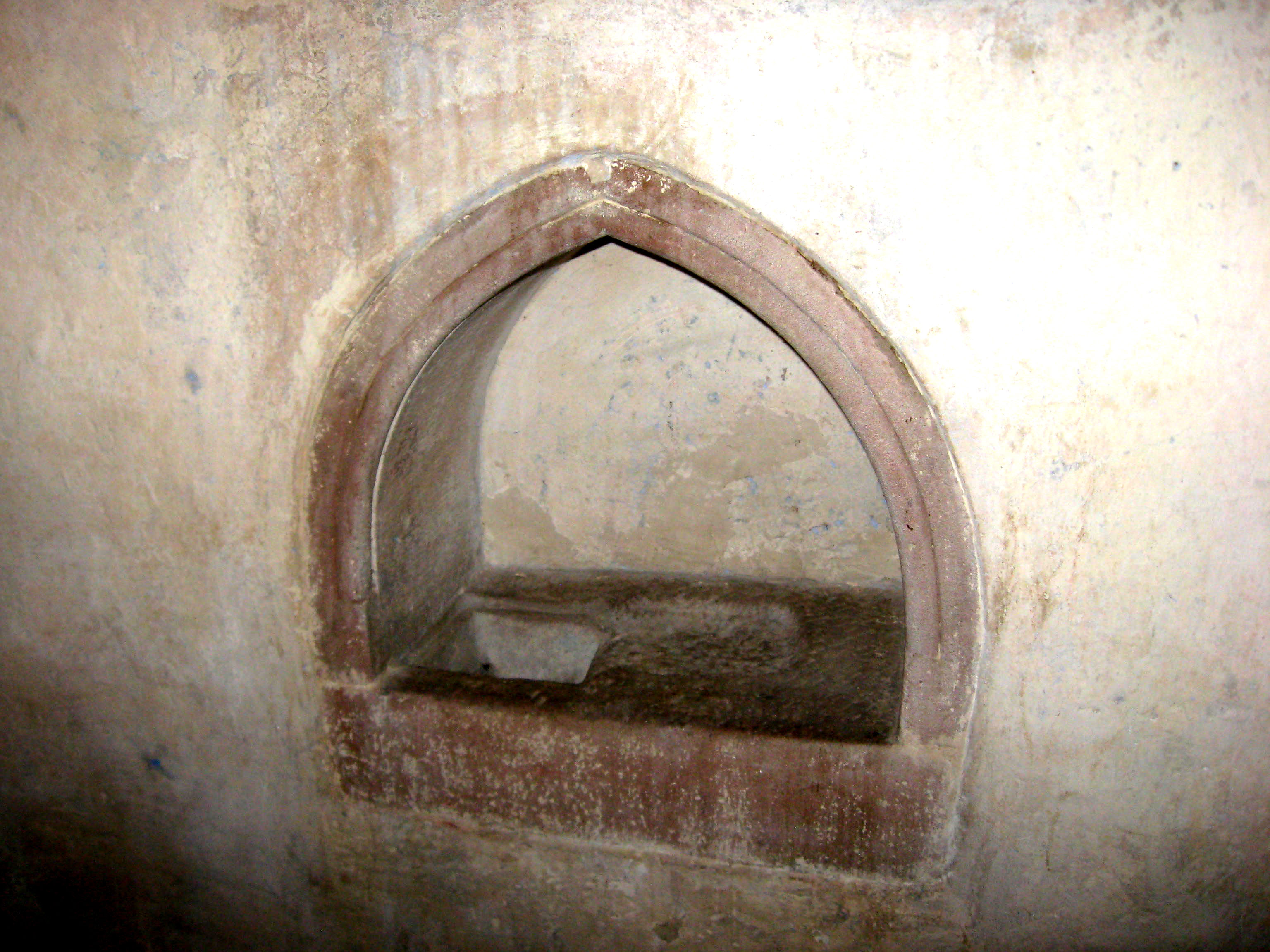 Klingenmünster, Nikolaus-Kapelle: in der Südwand des Chors Ausgussnische, wobei die Flüssigkeit im Mauerwerk nach unten geführt wird; rechts daneben eine Fläche zum Abstellen liturgischer Geräte